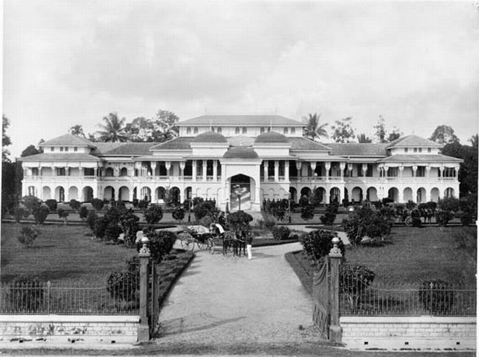 Foto. Het paleis van de Sultan van Deli te Medan.